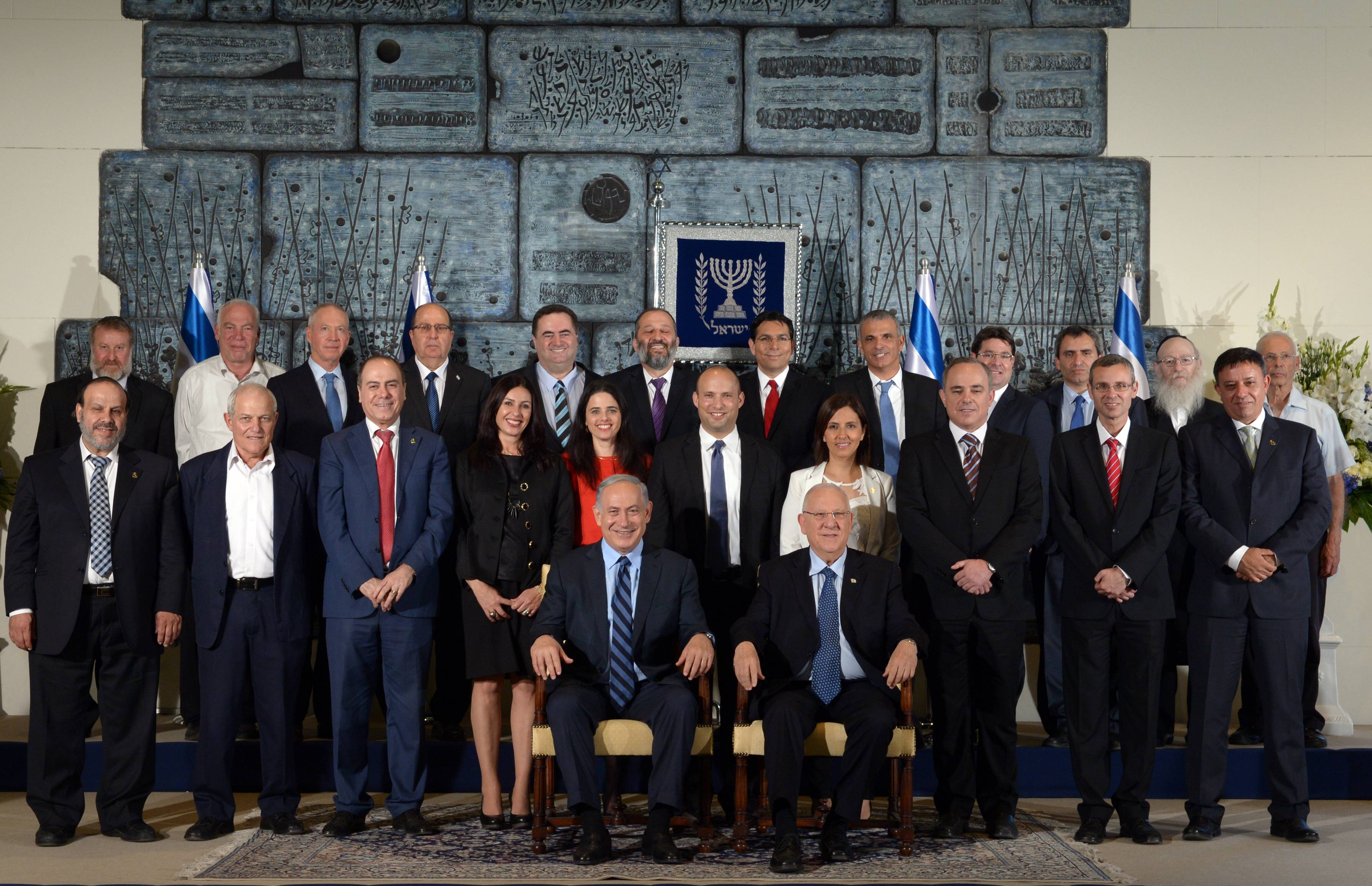 ממשלת ישראל ה-34 במעמד נשיא מדינת ישראל ראובן ריבלין וראש הממשלה בנימין נתניהו